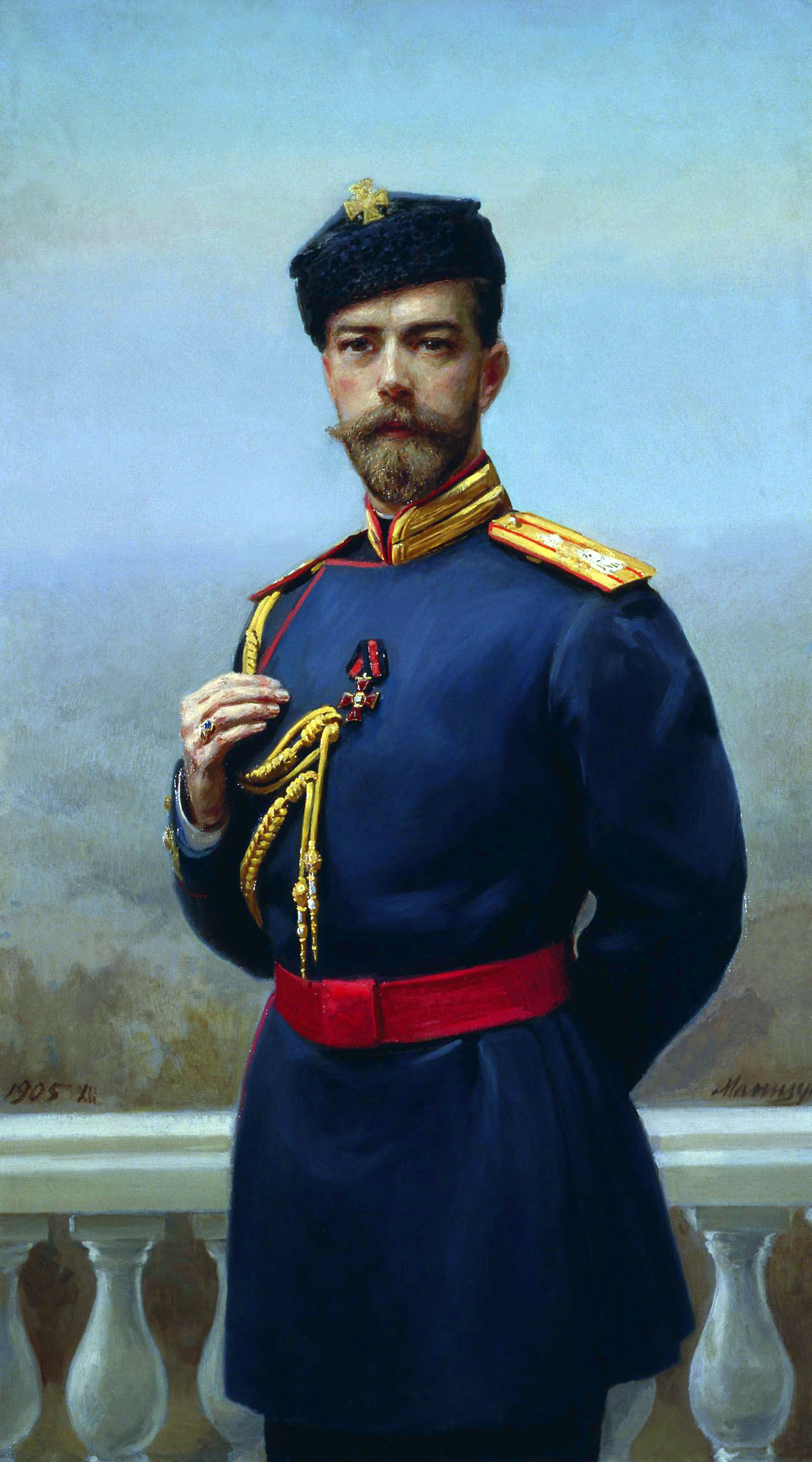 Russian tsar Nicholas II of Russia with the order of St. Vladimir (Портрет Императора Николая II в мундире лейб-гвардии 4-го стрелкового Императорской фамилии батальона, со знаком ордена Святого Владимира IV степени).